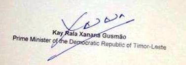 Assinatura do primeiro-Ministro de Timor Leste, Kay Rala Xanana Gusmão.